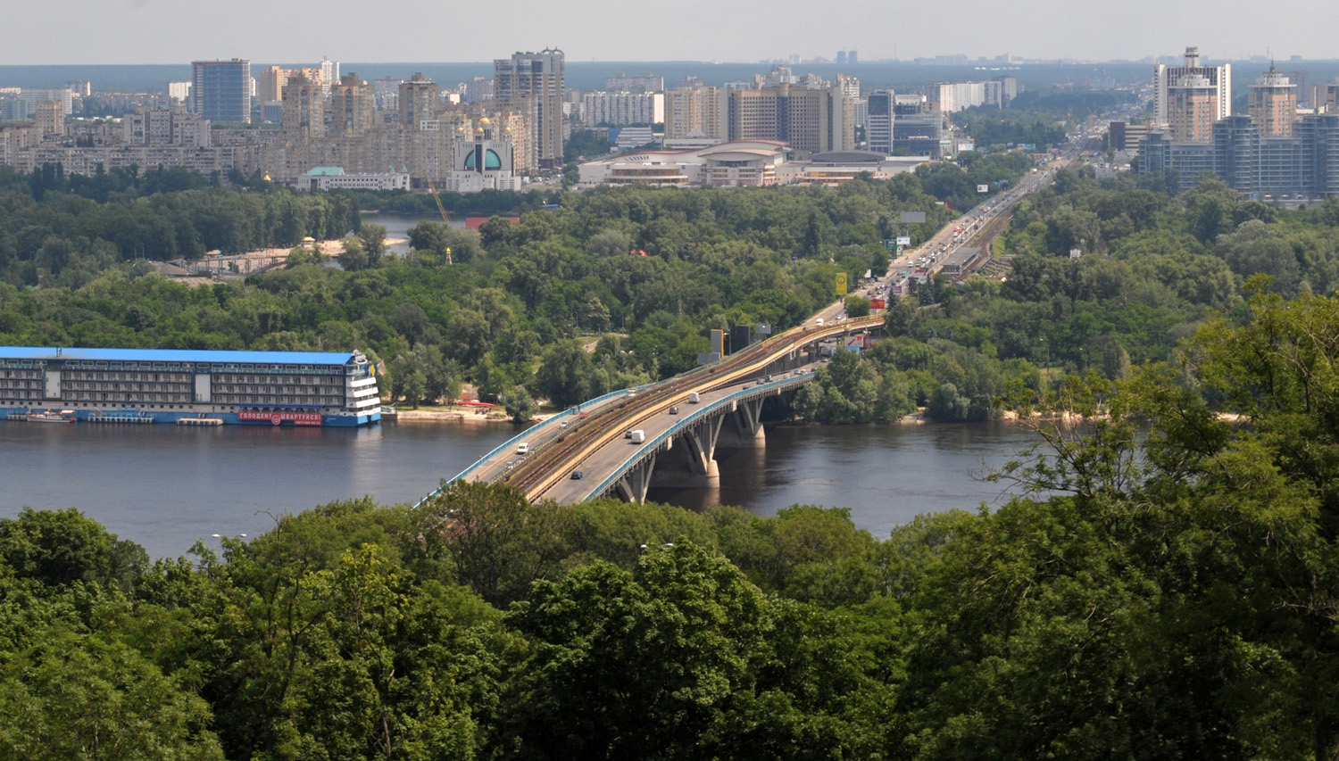 Міст Метро, Київ, Набережна Дніпра